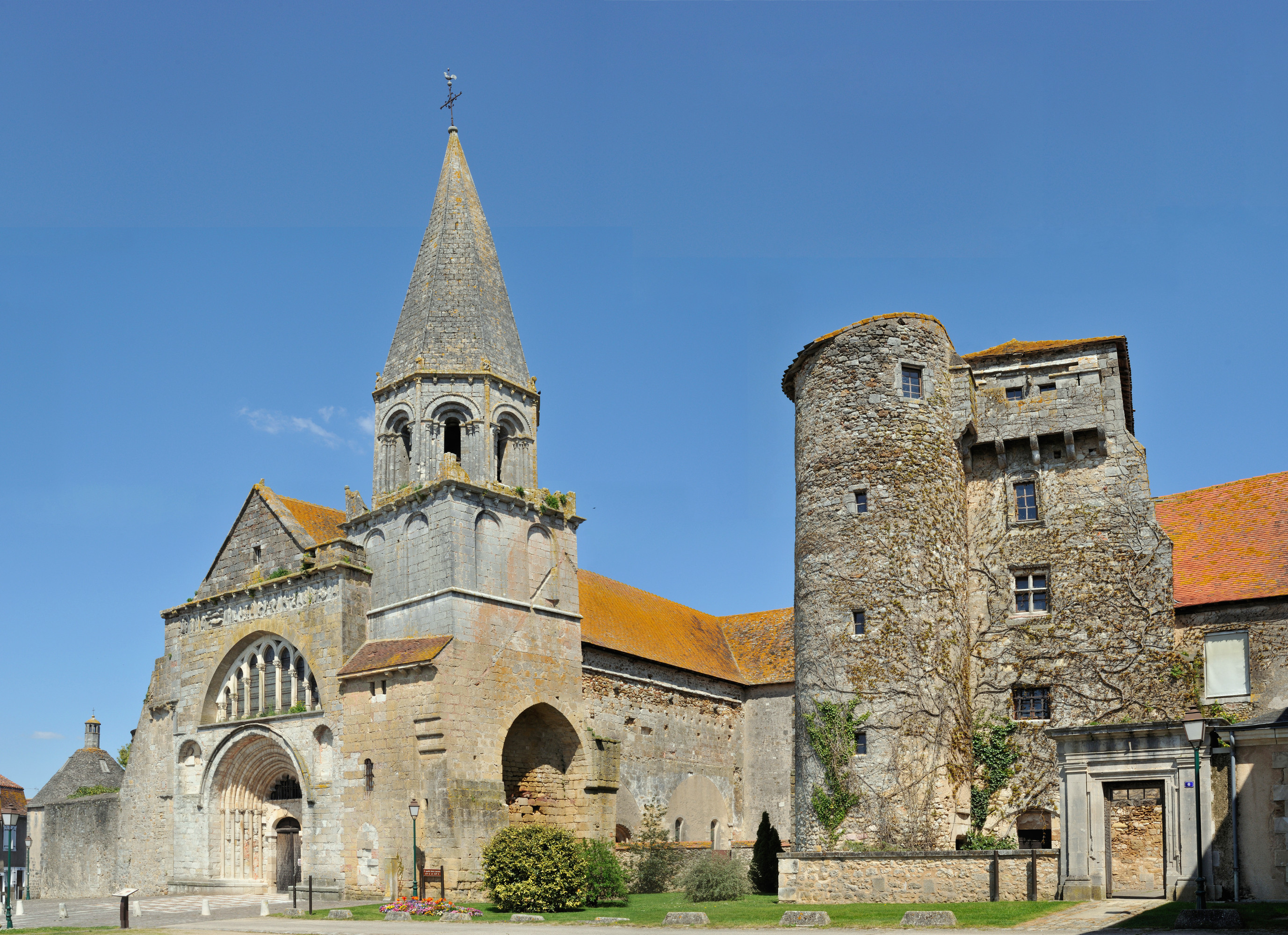 Façade de la chapelle Saint-Laurent à Montmorillon et ancien Hôtel-Dieu